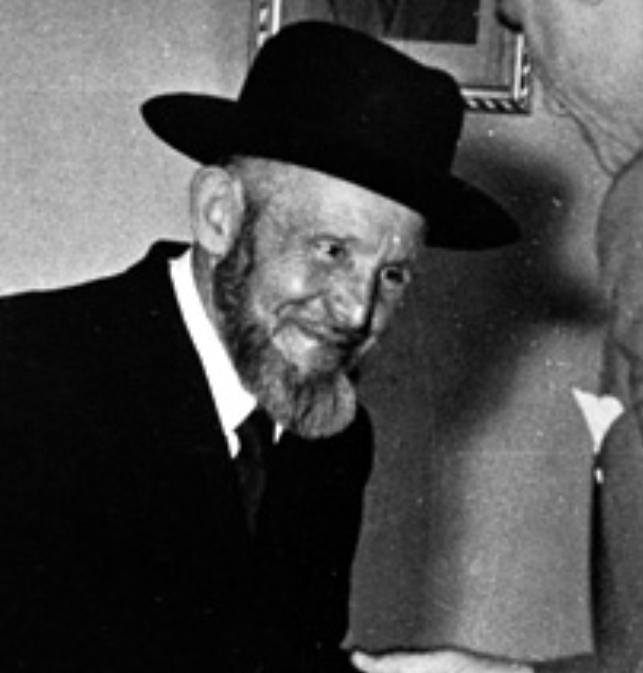 הרב בן ציון ליכטמן, ביירות, לבנון, 1955-1956 לערך